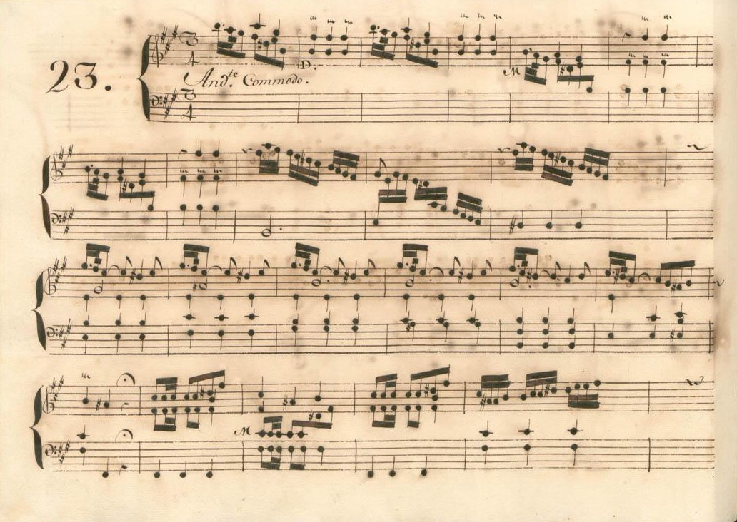 La sonate K. 380, telle qu'elle se présente dans le manuscrit de Parme, volume X no. 23.